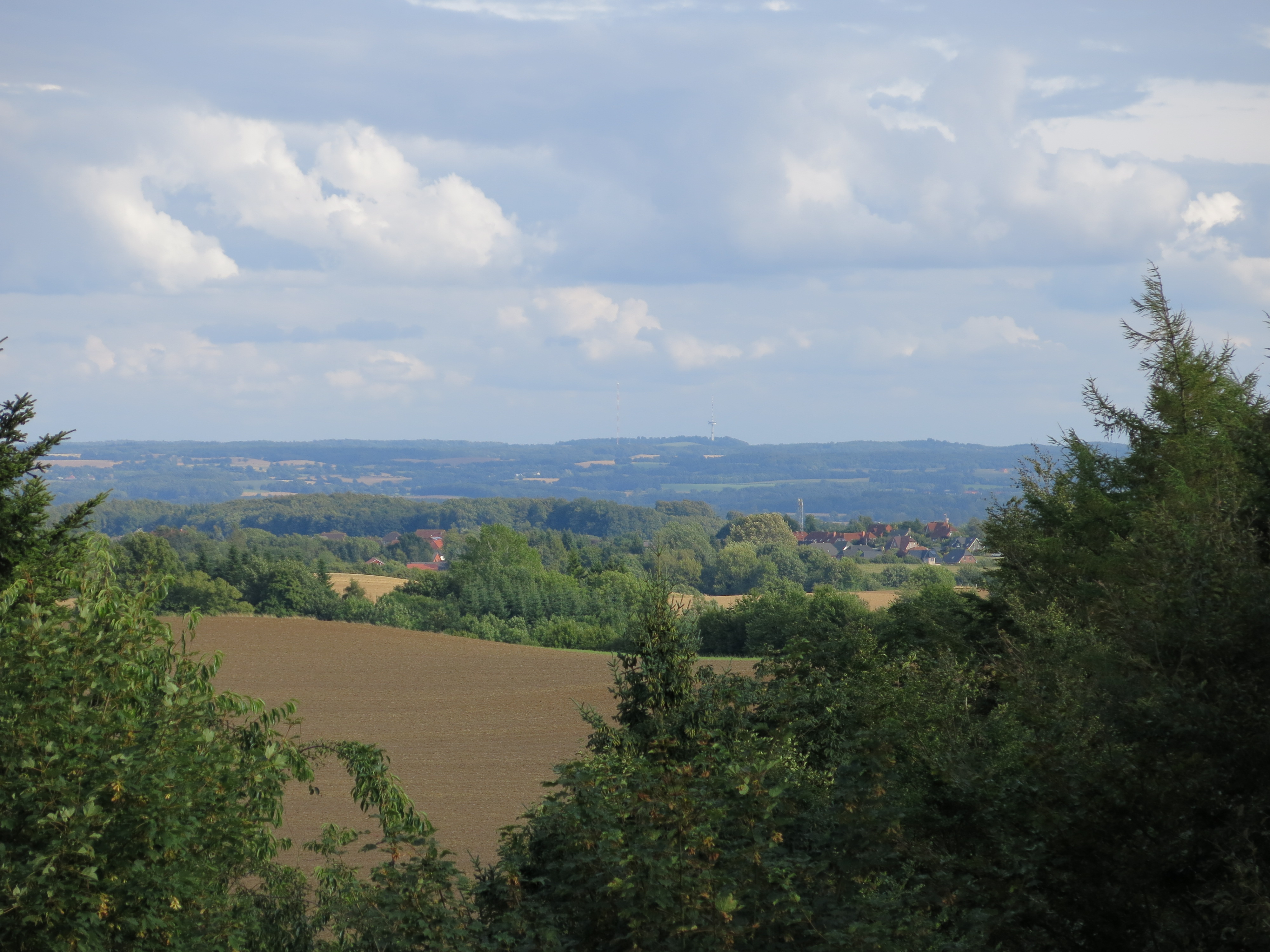 Der Bungsberg, höchster Berg Schleswig-Holsteins, von Nordwesten, aufgenommen vom Aussichtsturm Hessenstein auf dem Pilsberg bei Panker.